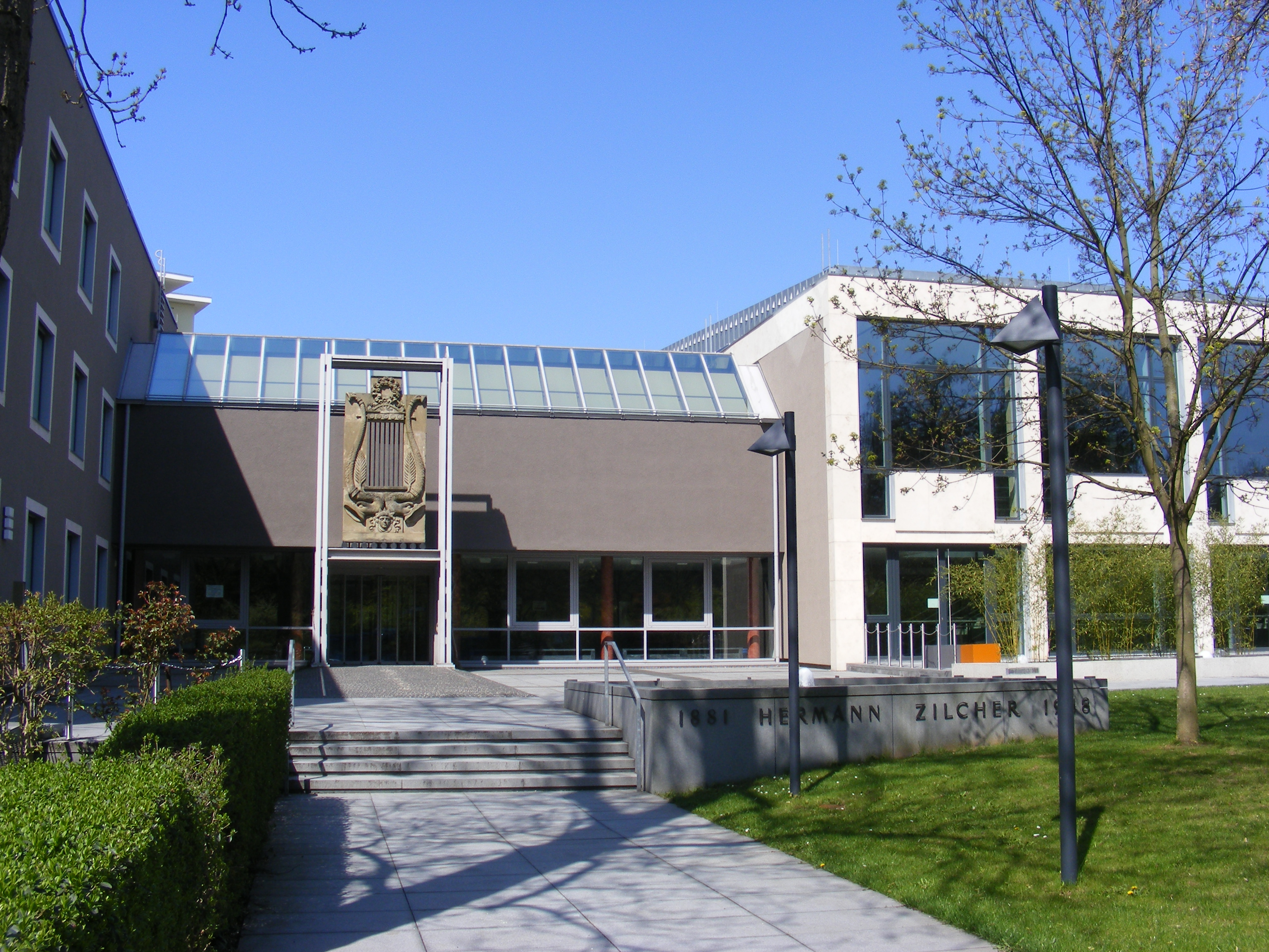 Hochschule für Musik, Würzburg, Außenansicht.